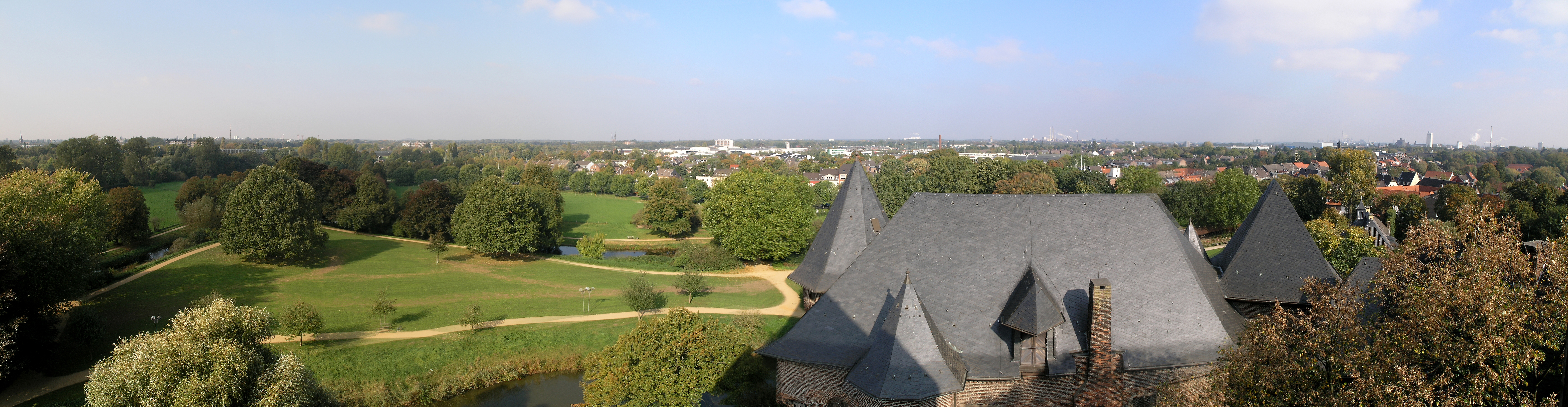 Северный Рейн-Вестфалия, Крефельд - замок Бург Линн (панорама)